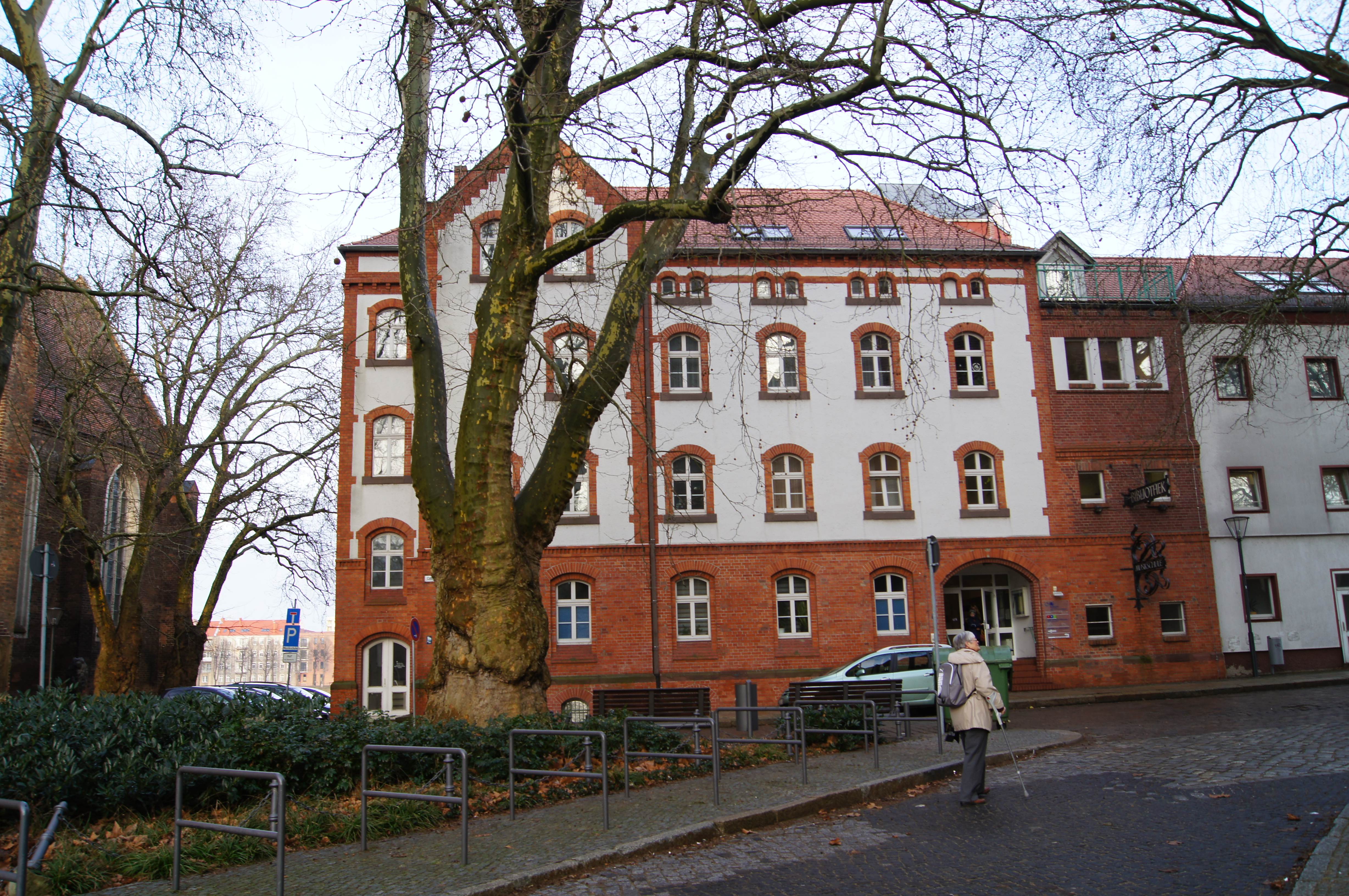 Musikschule in Frankfurt (Oder), Brandenburg, Deutschland